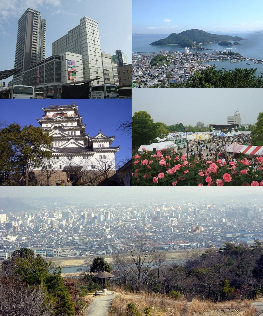 広島県福山市のモンタージュ画像。